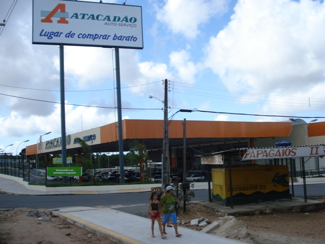 Atacadão Natal Norte em Natal, Rio Grande do Norte, Brasil